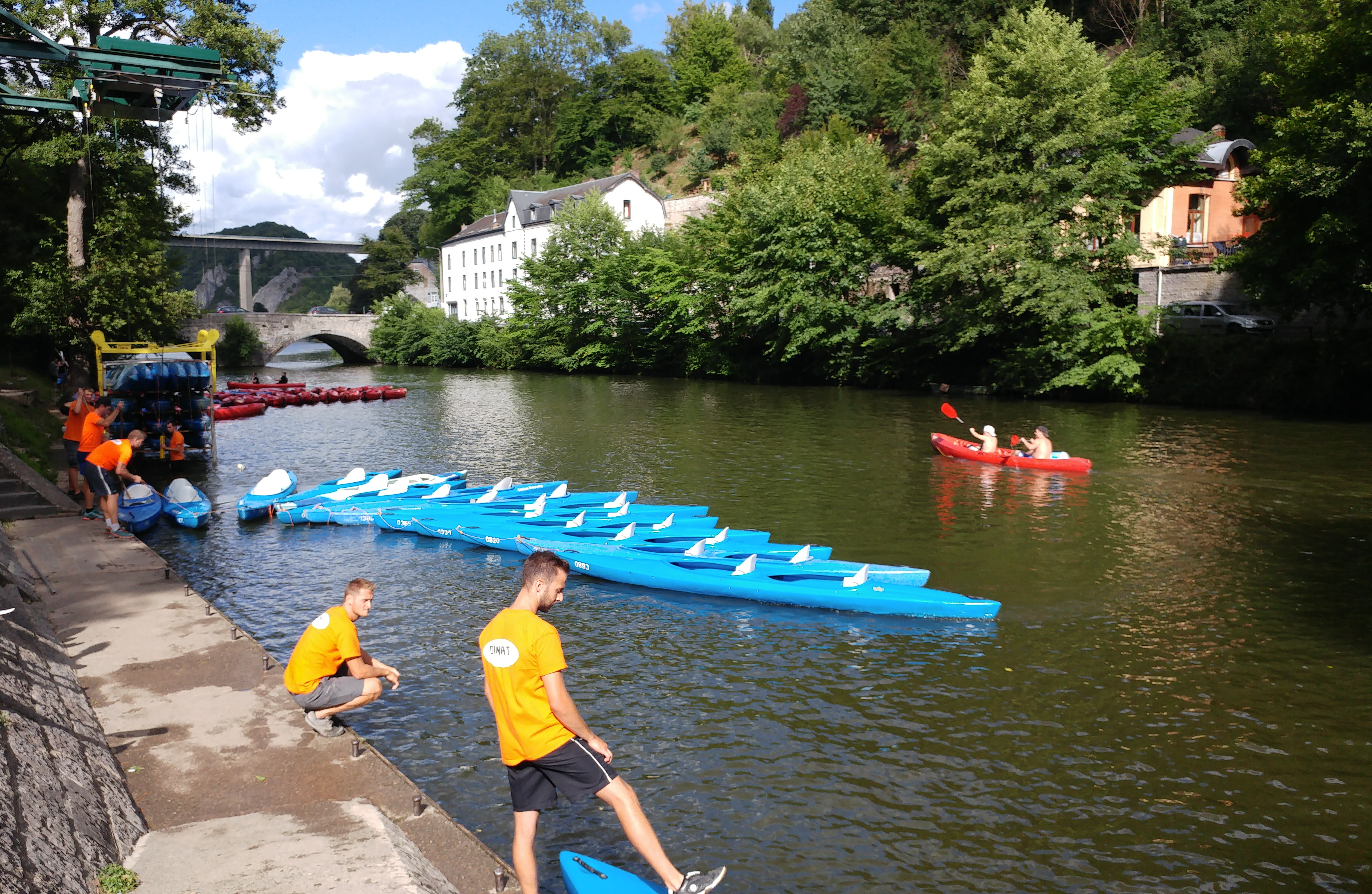 Arrivée des kayaks et rassemblement avant de les remonter en camions, à Anseremme sur la Lesse